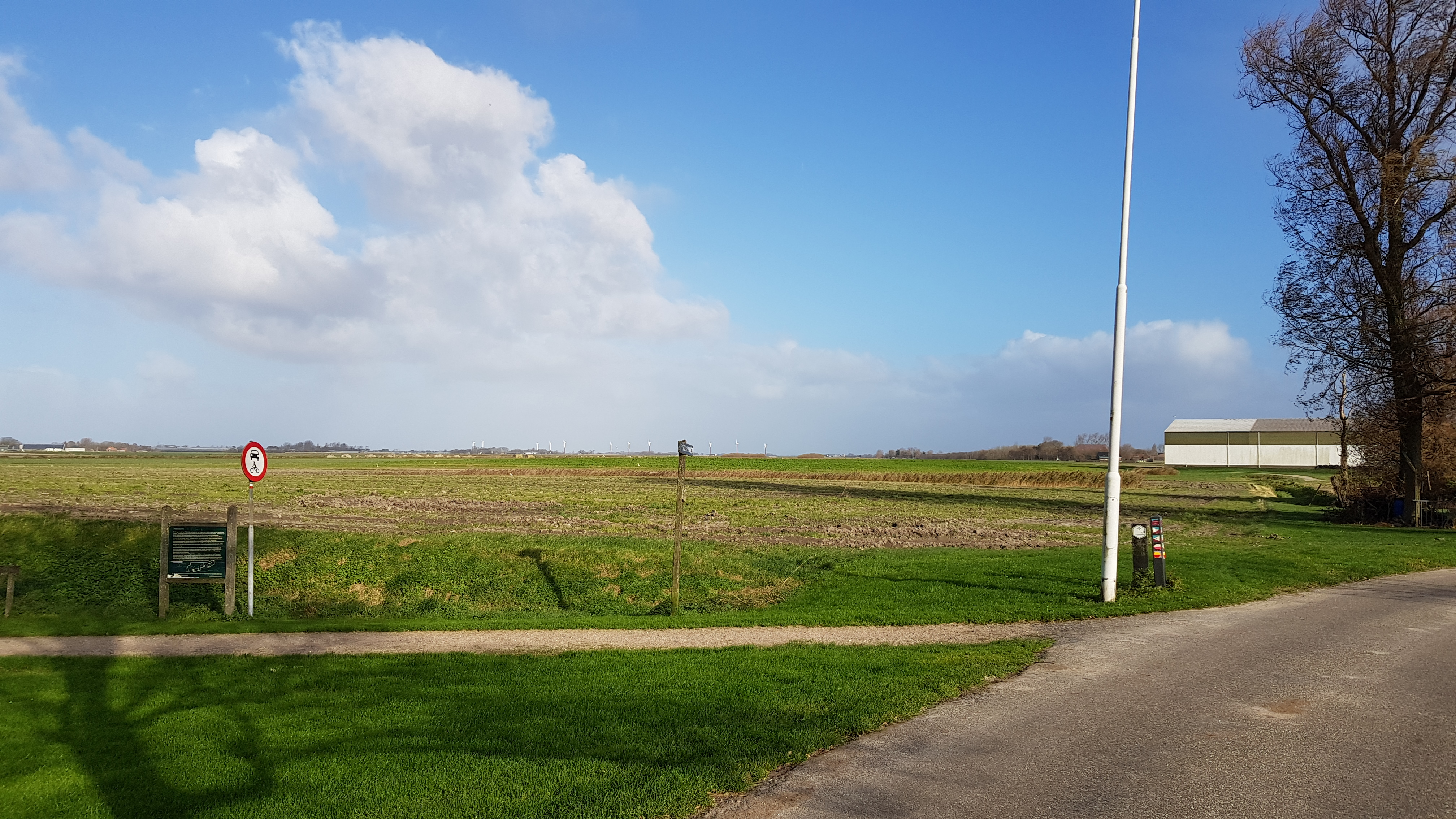 Terpenreeks Wijnaldum, Harlingen, Nederland